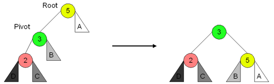 Imagem demonstrando como funciona uma rotação simples à direita em uma árvore AVL.